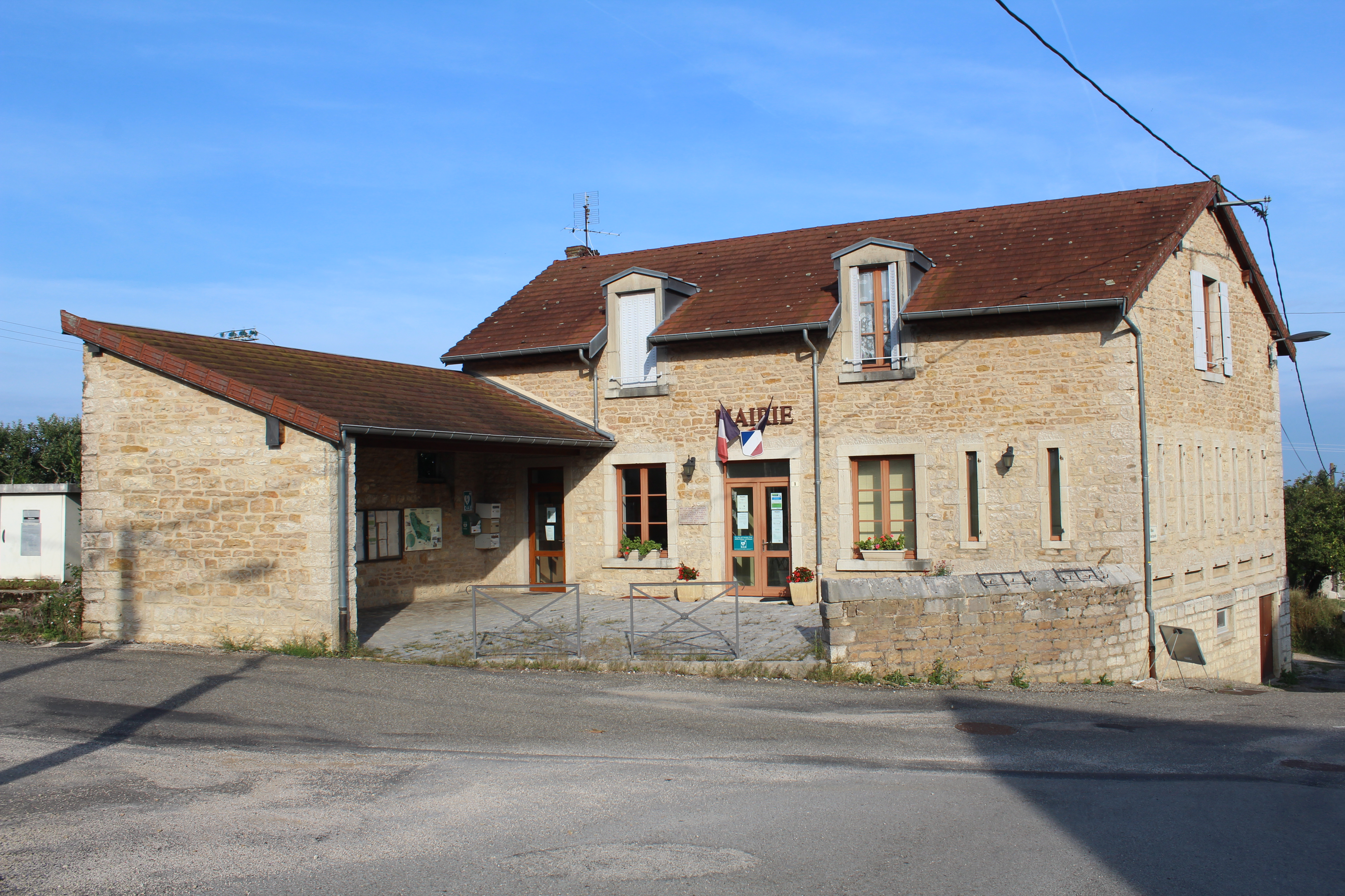 Mairie d'Augea.